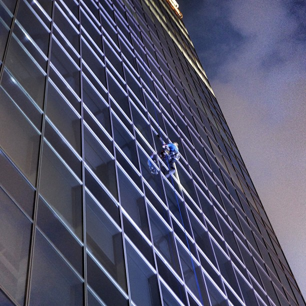 Ален Робер поднимается по 27-ми этажам нового центрального офиса Мэйл.ру в Москве